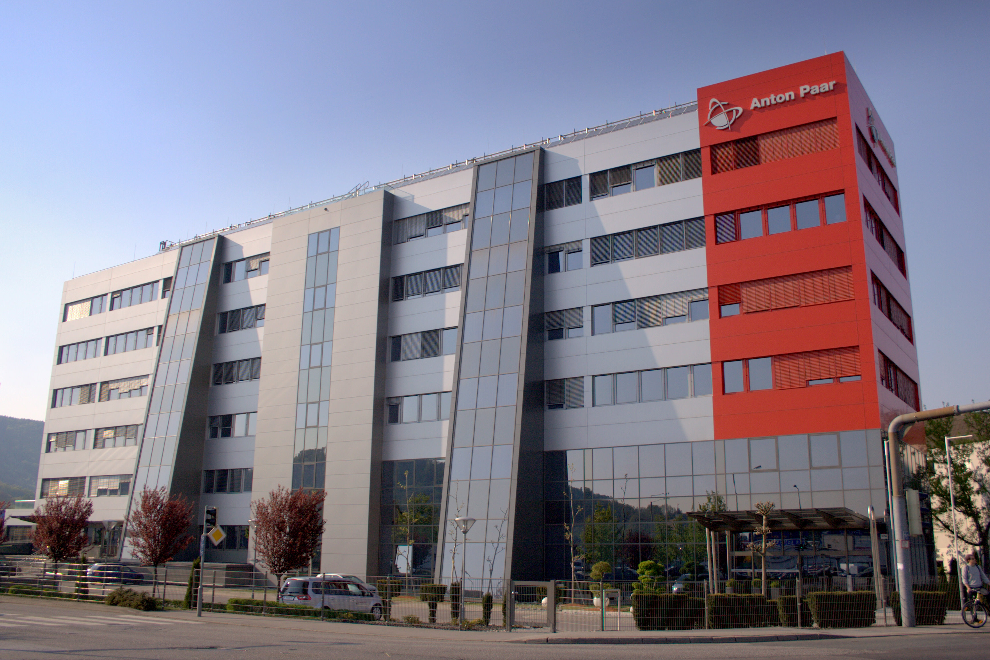 Graz Anton Paar GmbH